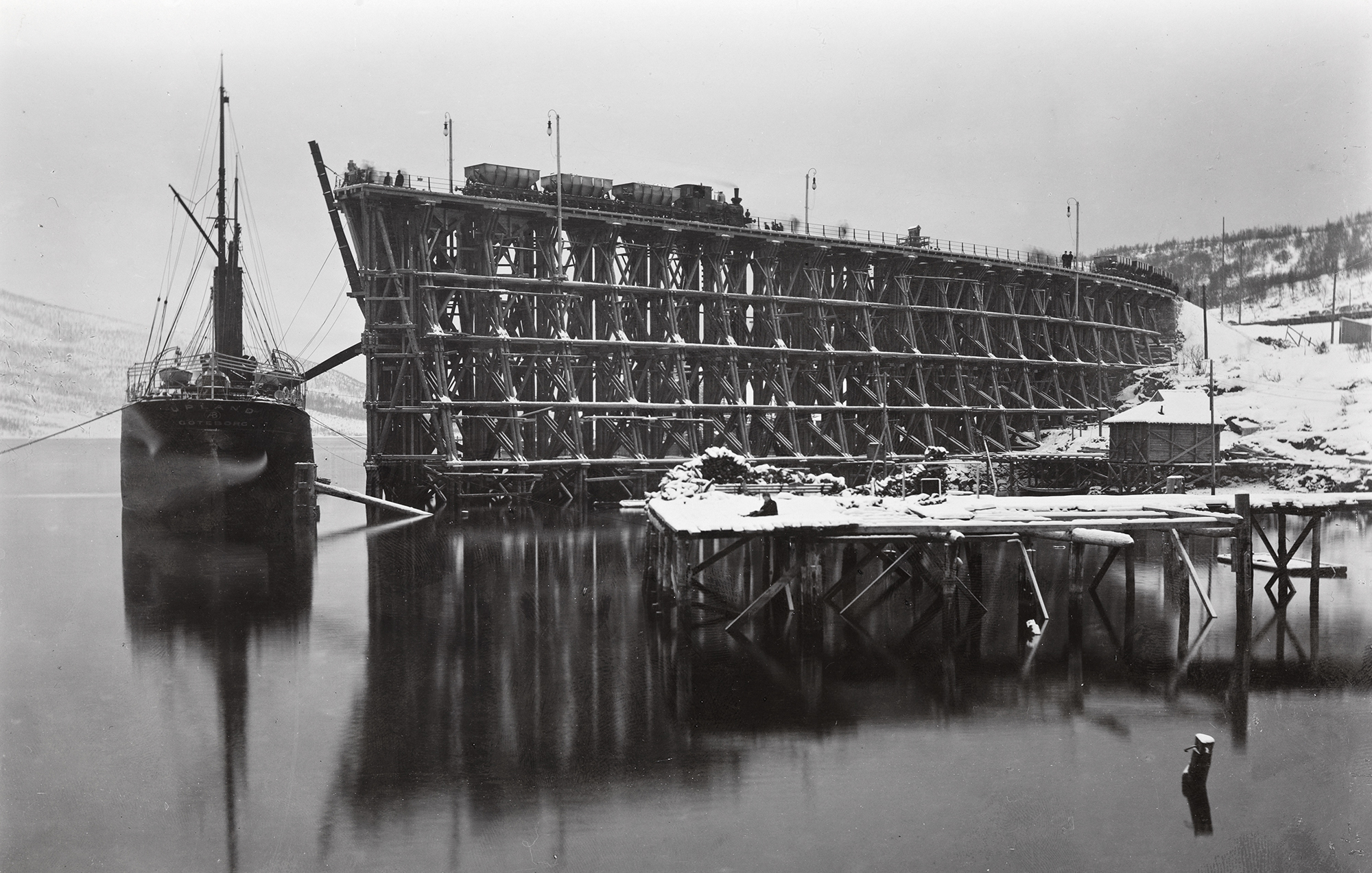 Tittel / Title: No. 145. Første Malmudskibning fra Narvik Dato / Date: 1903 Fotograf / Photographer: Th. Brændmo (Narvik) Sted / Place: Nordland, Narvik Eier / Owner Institution: Nasjonalbiblioteket / National Library of Norway Lenke / Link: Bildesignatur / Image Number: bldsa_FA1200